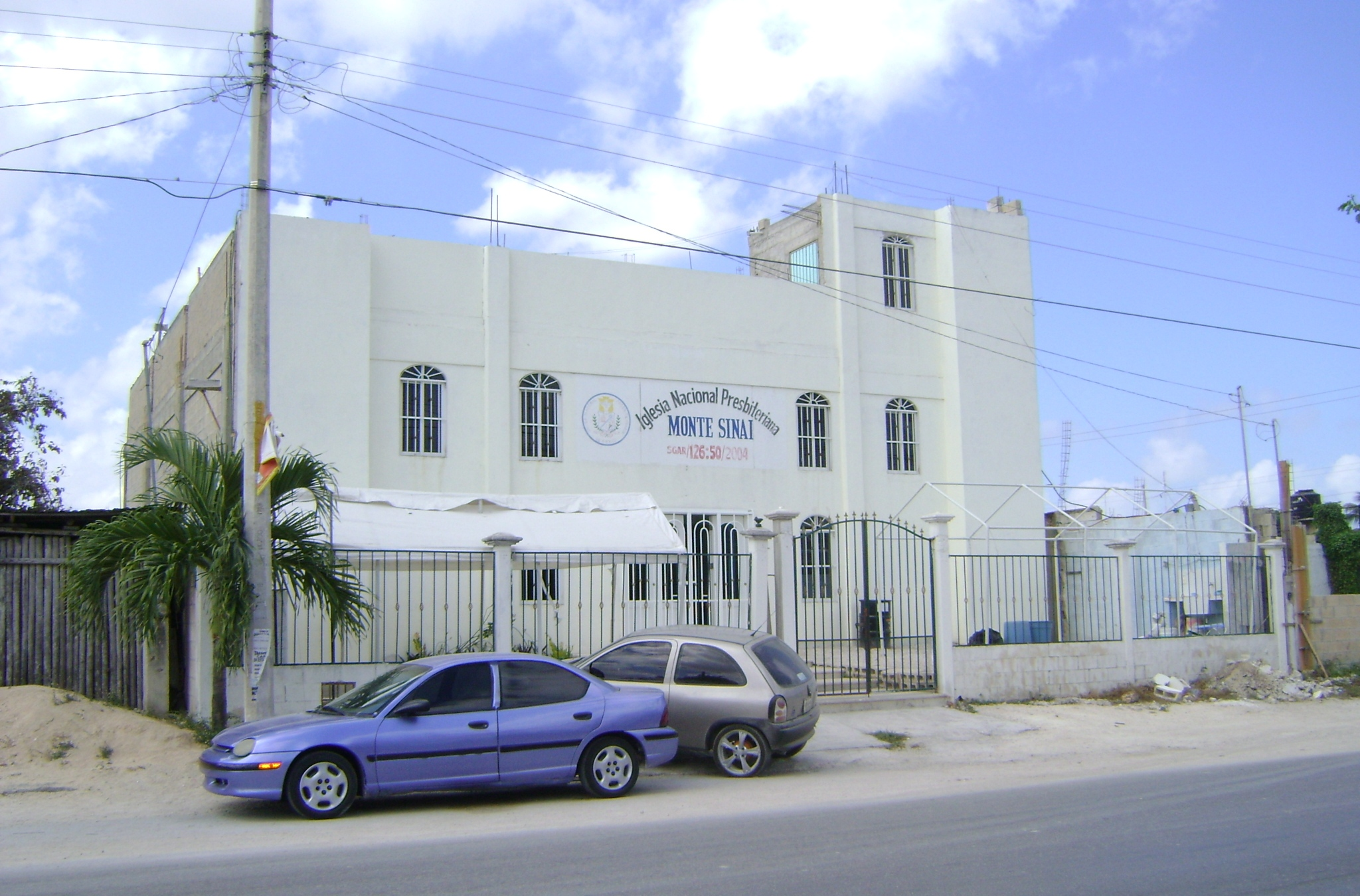 Iglesia Nacional Presbiteriana de México Monte Sinaí - Av. Niños Héroes Reg. 228 Mza. 33 Lte. 7